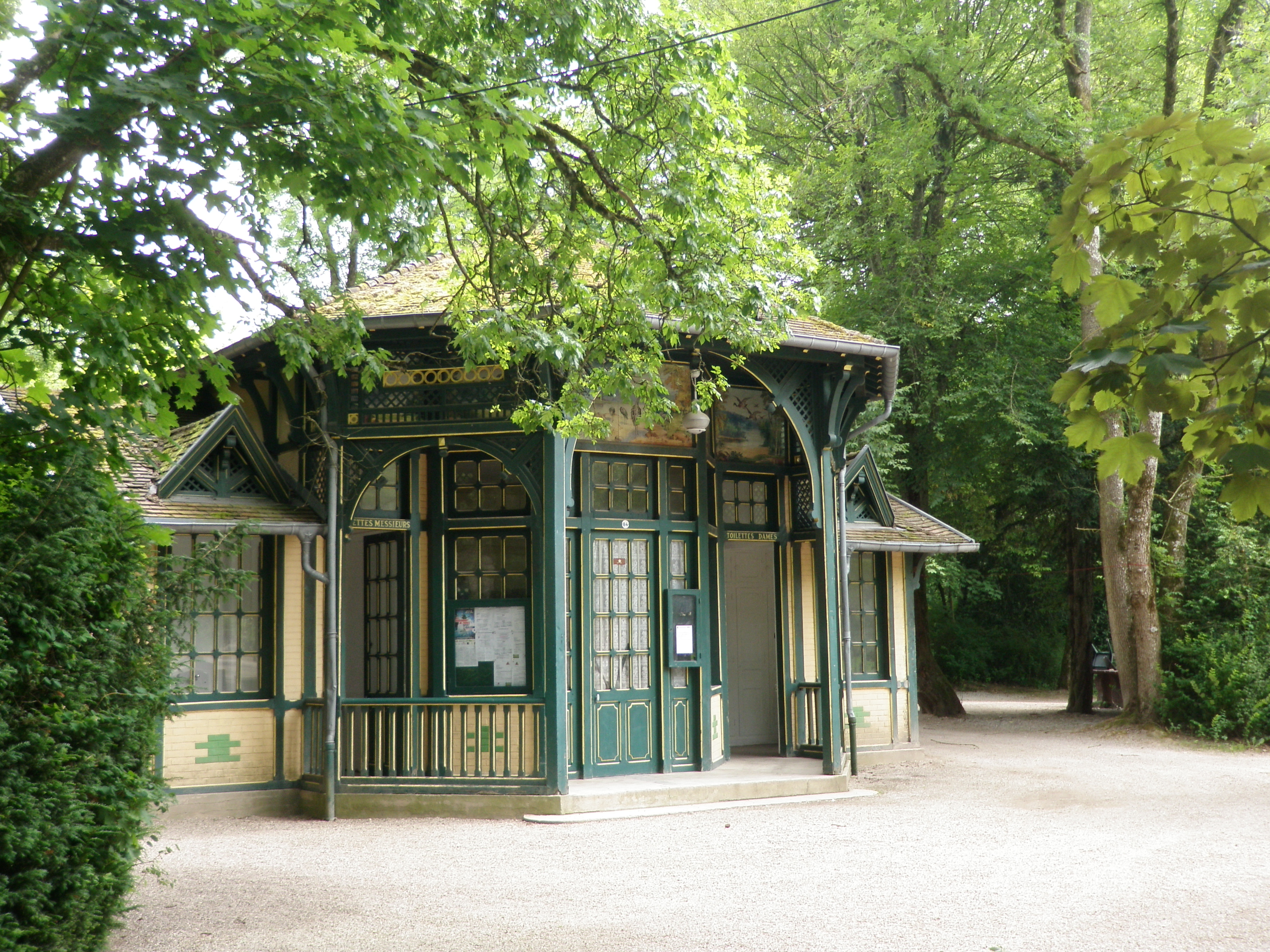 Chalet d'Aisance (1923)